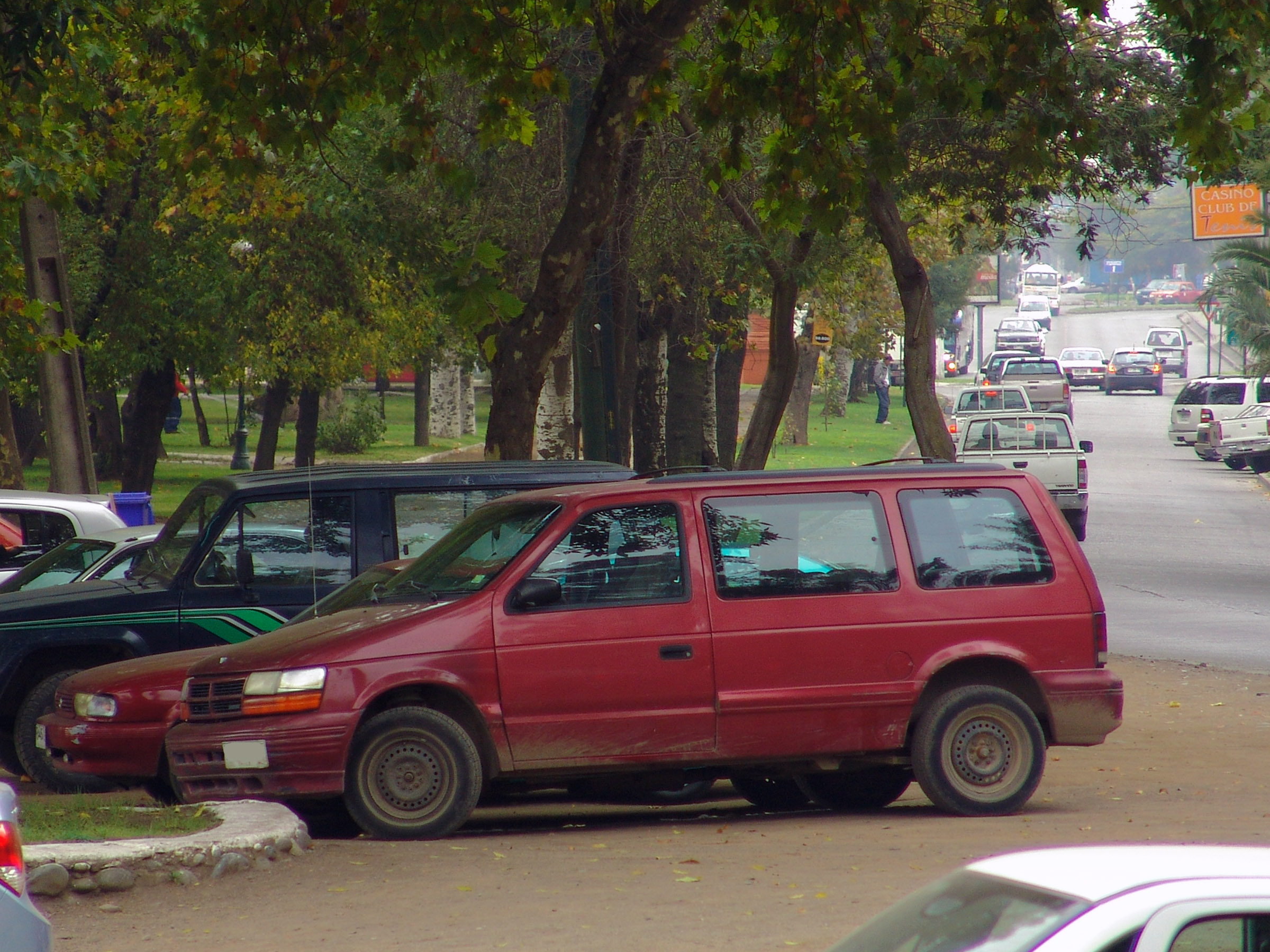 Dodge Caravan 2.5 1993